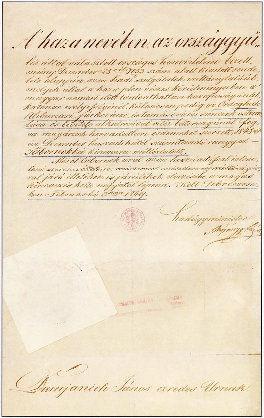 Damjanich János tábornoki kinevezése Mészáros Lázár hadügyminiszter aláírásával Museum and Institution of Military History LocationBudapestCoordinates47° 30′ 14.7″ N, 19° 01′ 39.32″ E Established1922Website Accession number: Hadtörténelmi Levéltár, HL K. k. ausserord. Kriegsgericht zu Arad 113/24-2/b.